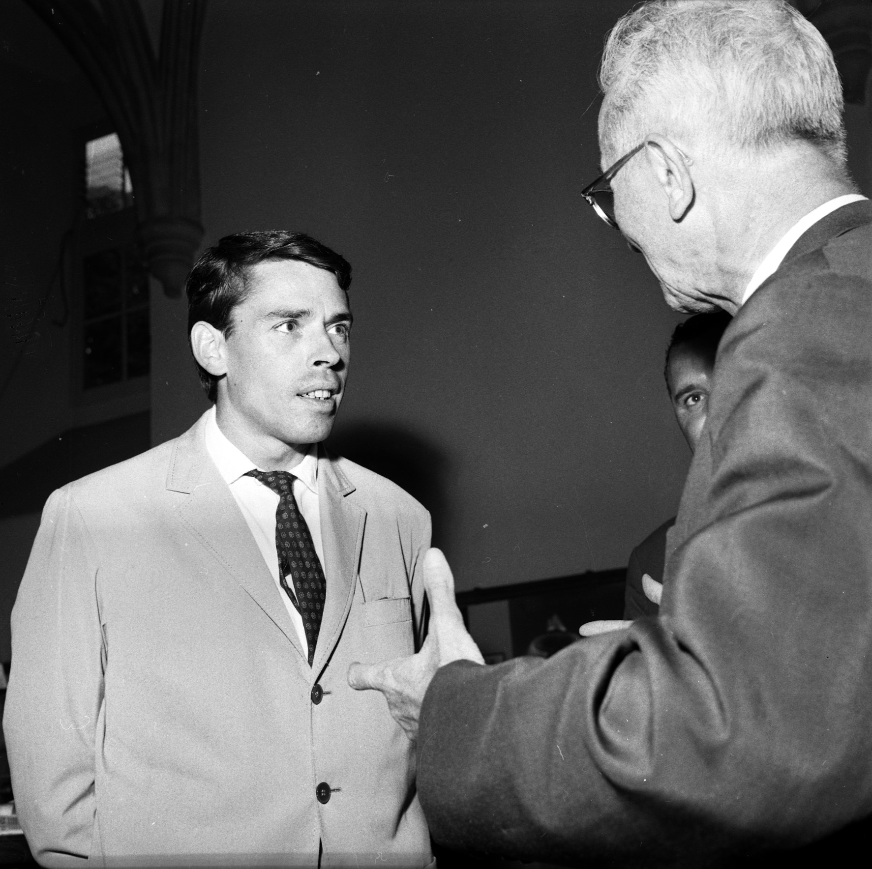 Donjon du Capitole. 1er septembre 1962. PLan en buste de Jacques Brel, chanteur français, discutant à l'intérieur du Donjon.